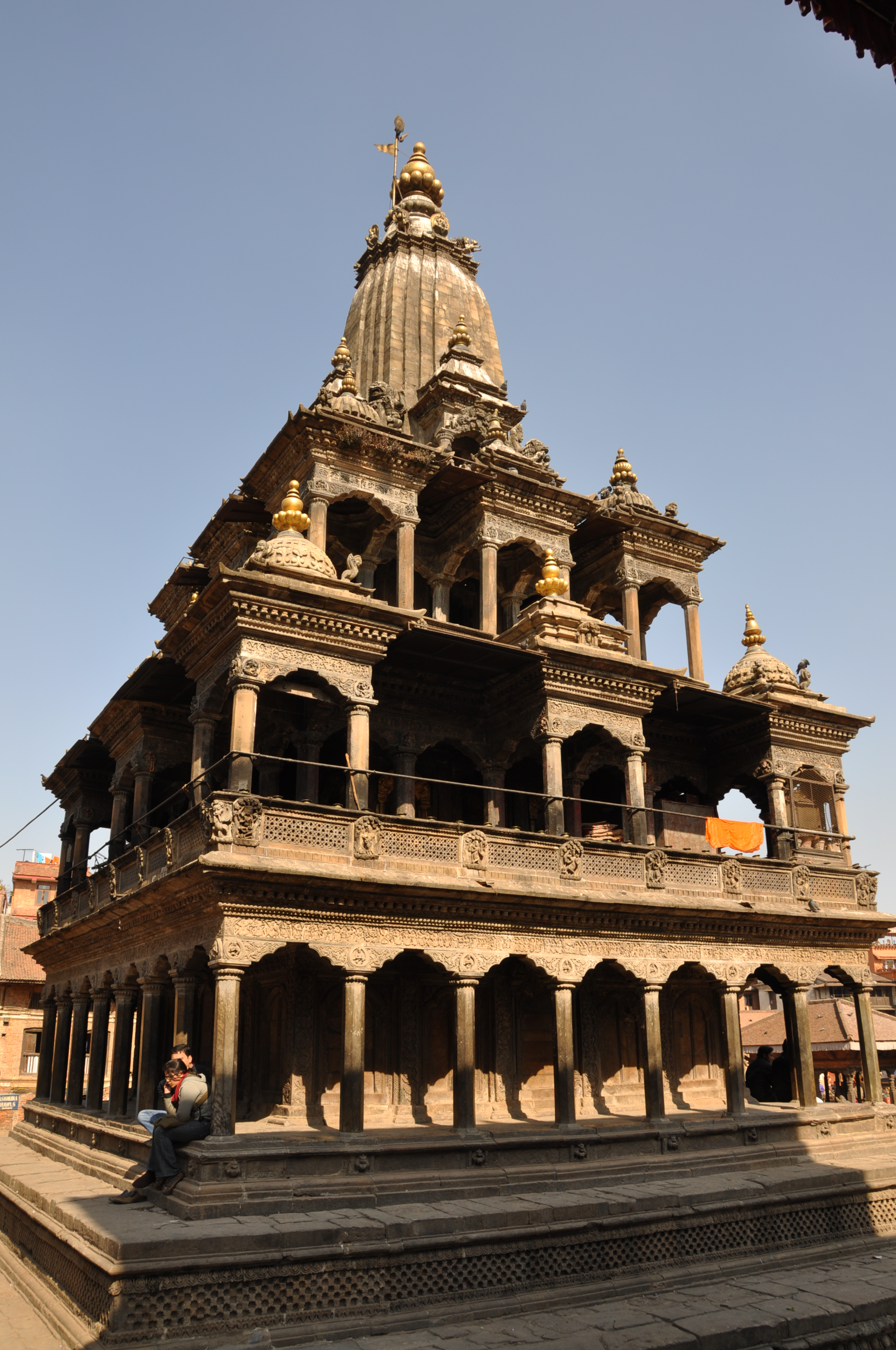 Patan Kathmandu